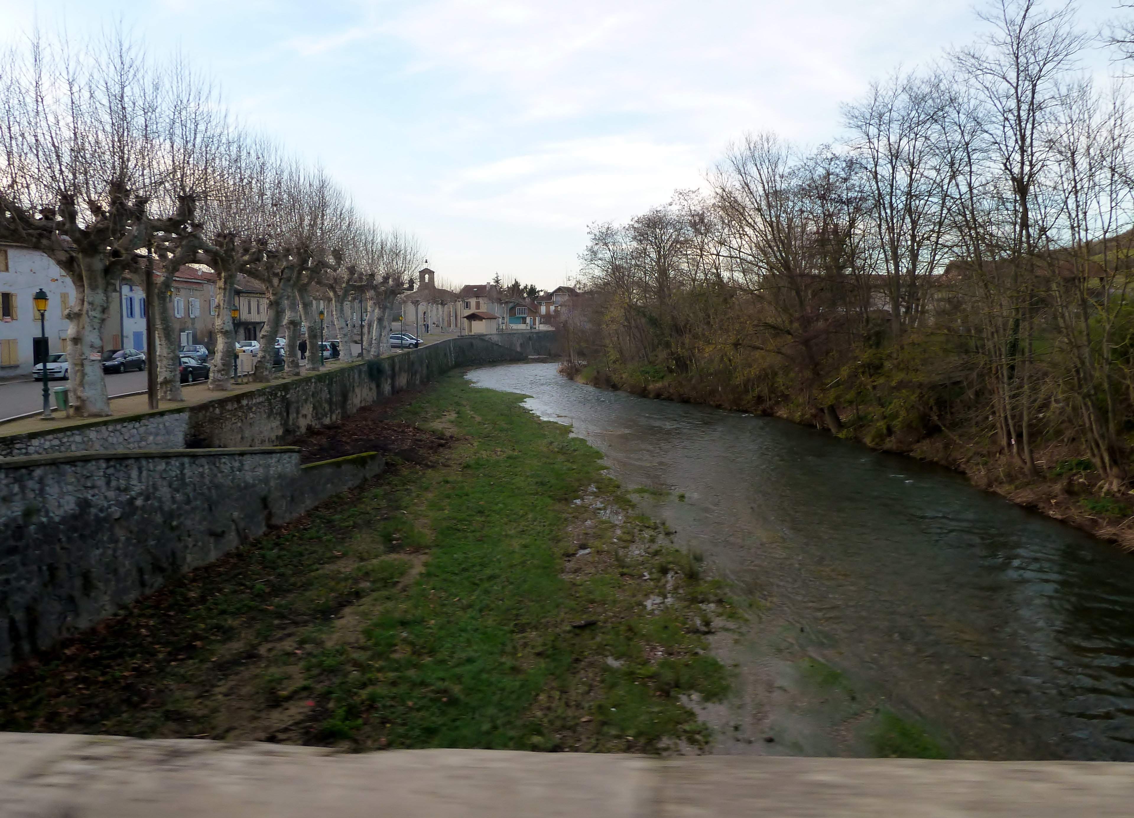 L'Arize à Sabarat